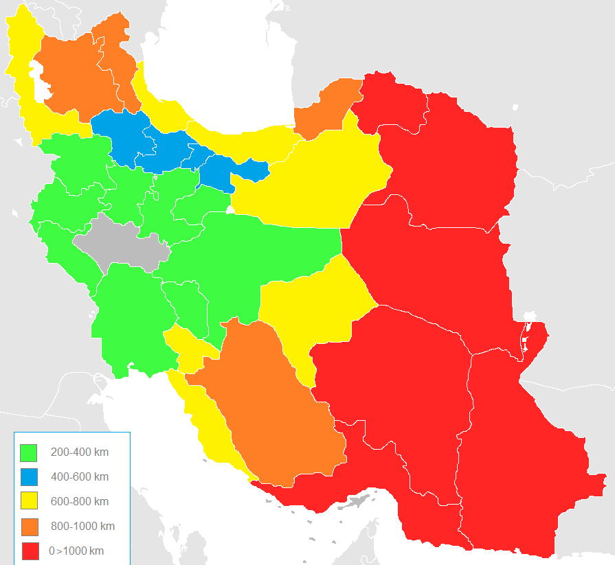 فاصلهٔ زمینی شهر خرم آباد با مراکز استان‌ها از رایج ترین مسیرها